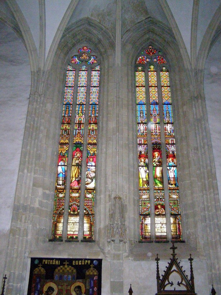 Vitrážové okná v južnej lodi katedrály